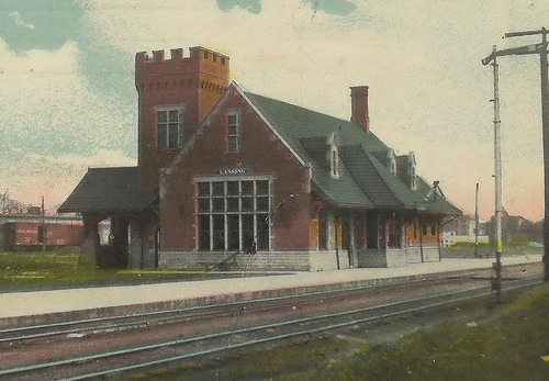 Gare du Grand Tronc, Lansing